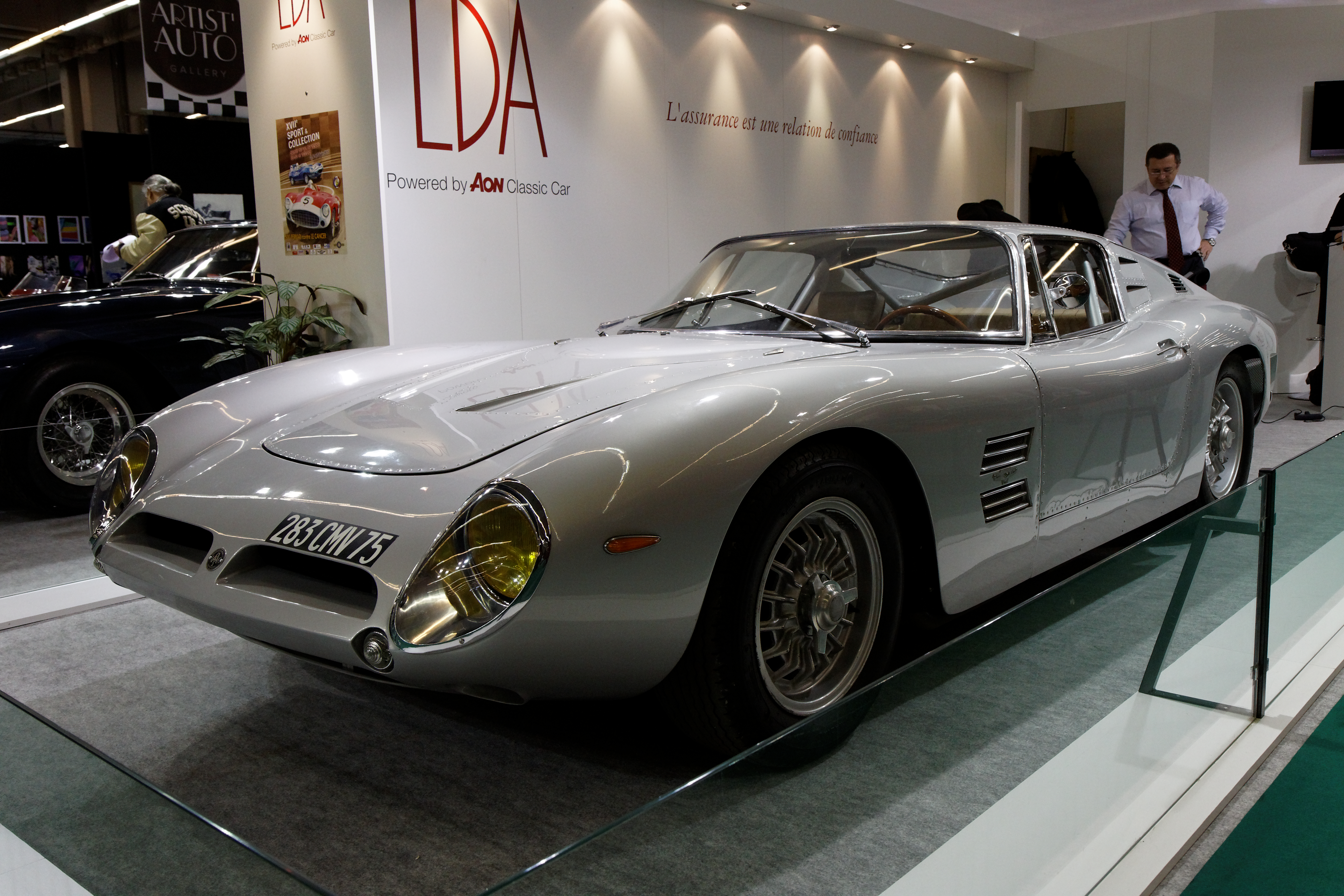 Photographie prise lors du salon rétromobile 2011 à Paris, porte de Versailles.